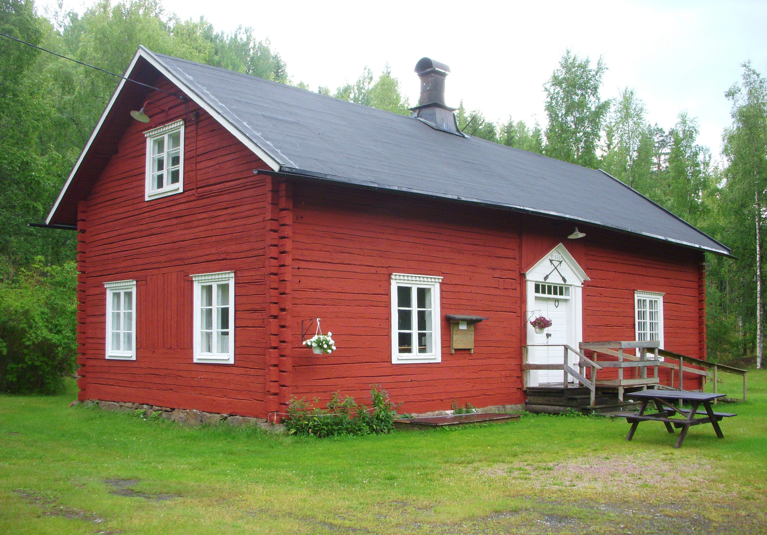 Strömsdals bruk, dagkarlsstugan